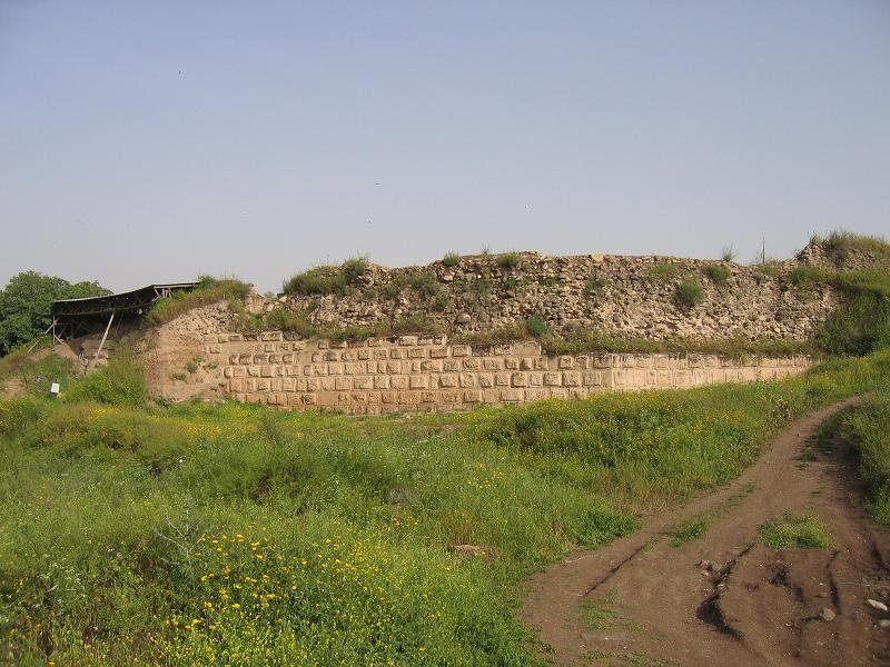 מבט כללי על צידו הצפוני של מצד עתרת צילמתי והעלתי באפריל 2006. אסף.צ 22:55, 14 אפריל 2006 (UTC)